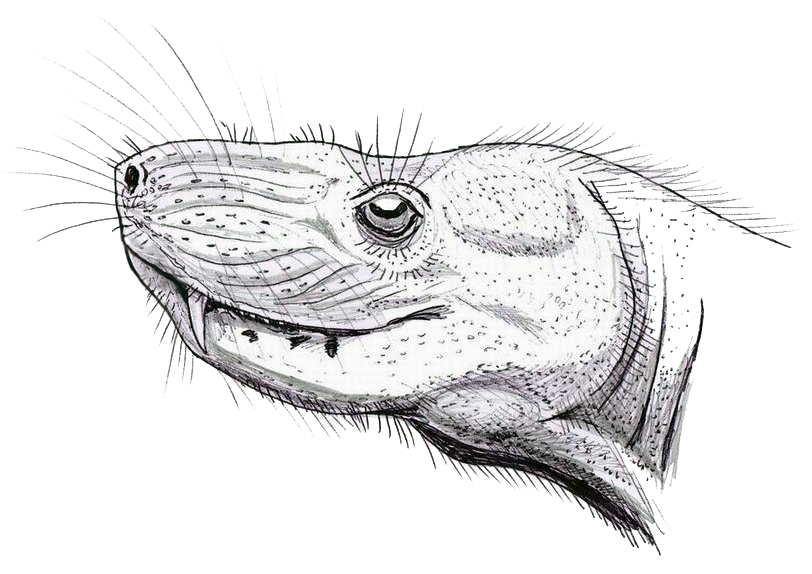 Голова Hofmeyria - позднепермского тероцефала. Южная Африка. Длина животного около 1 метра.